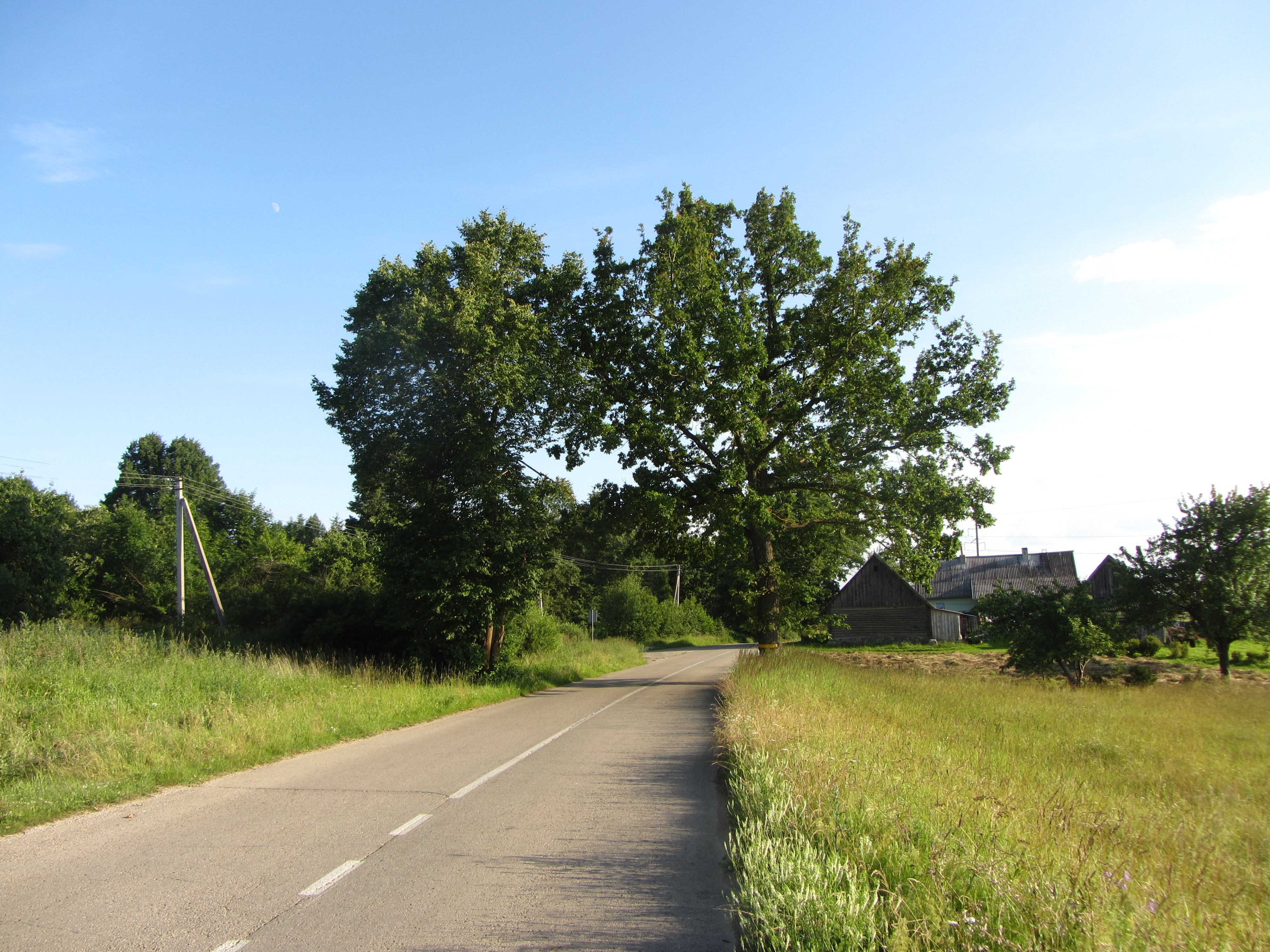 Zarasų sen., Lithuania